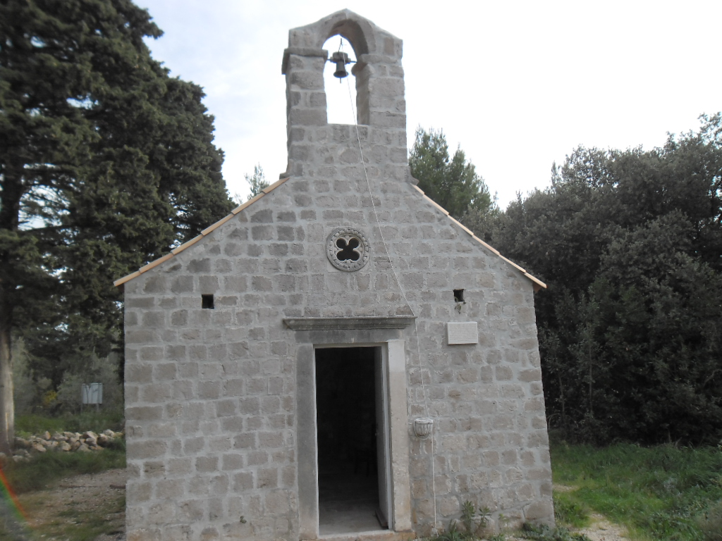 ranosrednjovjekovna Crkva sv. Stjepana u Suđurađu na otoku Šipanu